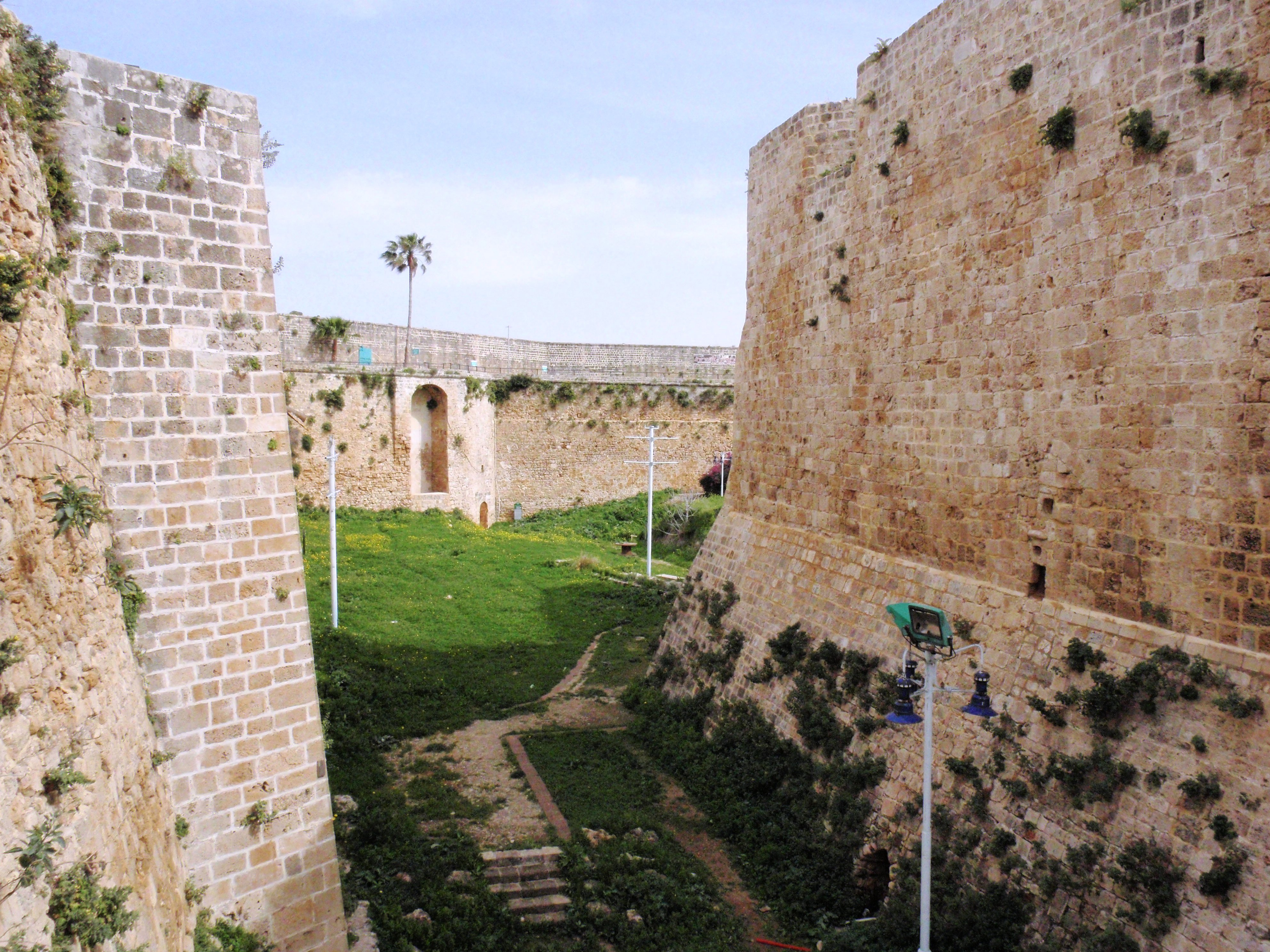 סיור בעכו Acre moat